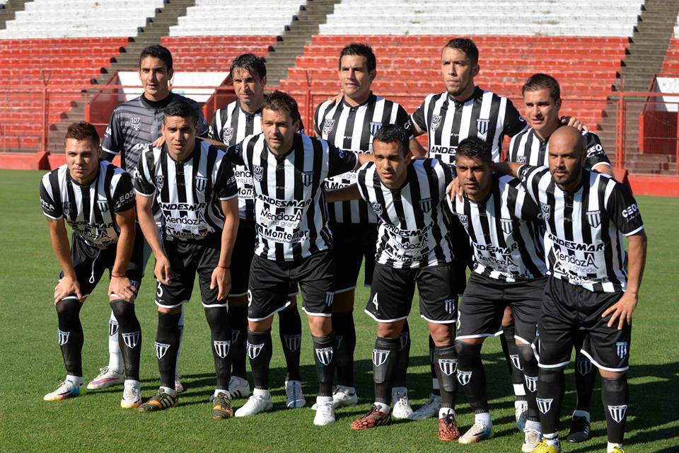 El equipo titular de Gimnasia de Mendoza que disputó la final por la permanencia en 2015. Parados: Leguiza, Oga, Marín, Albornoz y Garín. Agachados: Montiveros, Carrizo, Akerman, Corvalán, Amaya y Carranza.